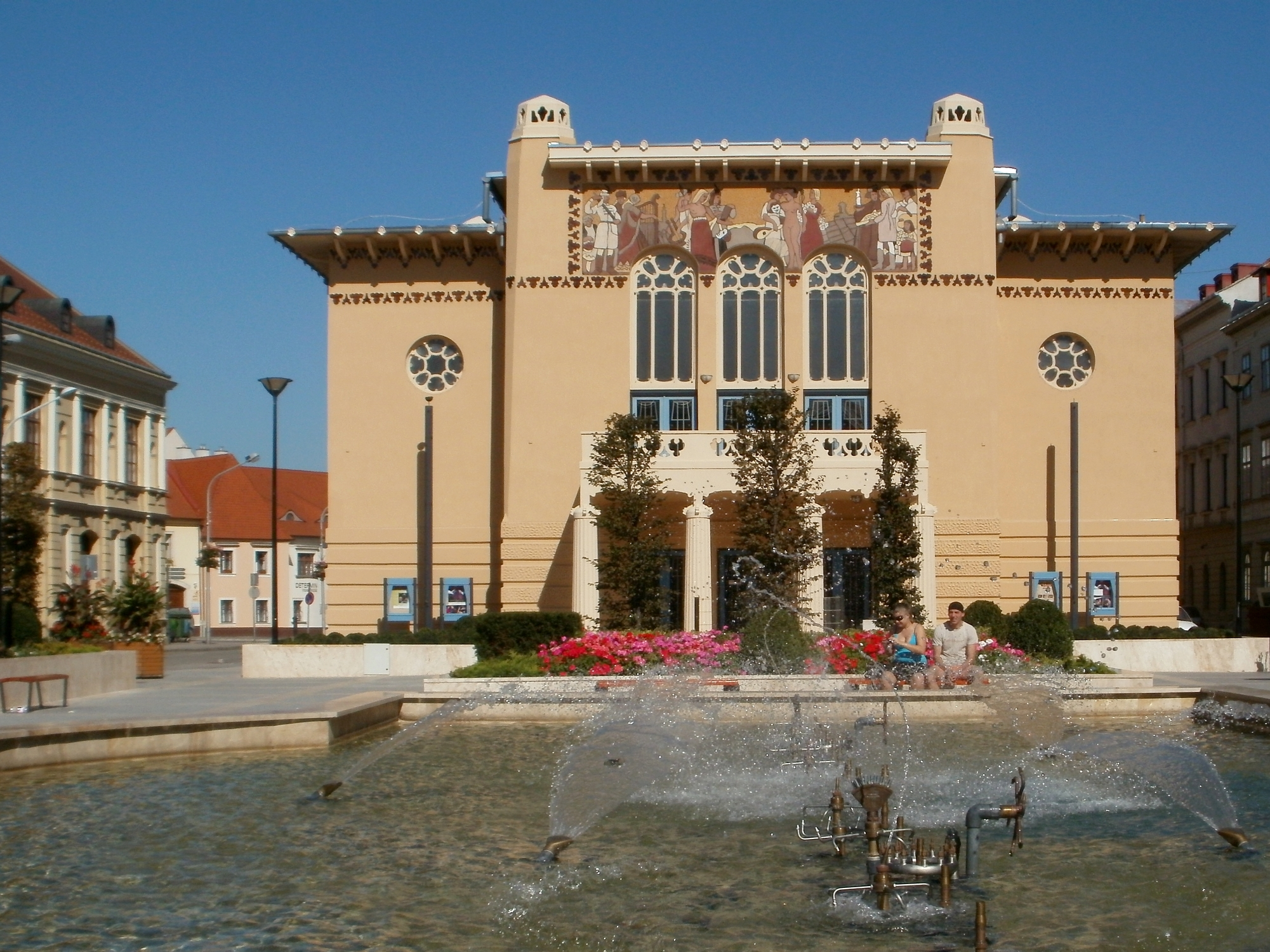 Petőfi Színház 9400 Sopron, Petőfi tér 1. Jegyiroda: 9400 Sopron, Liszt Ferenc utca 1.